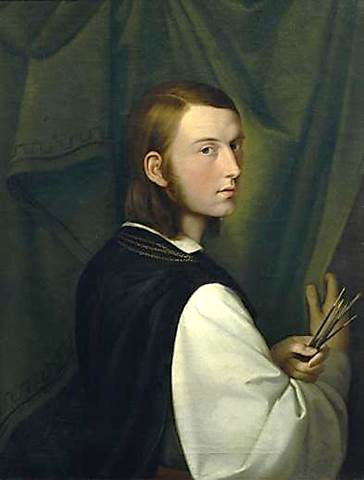 Self-portrait (1820)